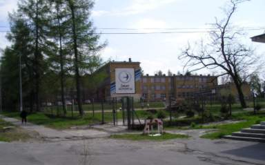 Zespol Szkol Sportowych w Tarnowie